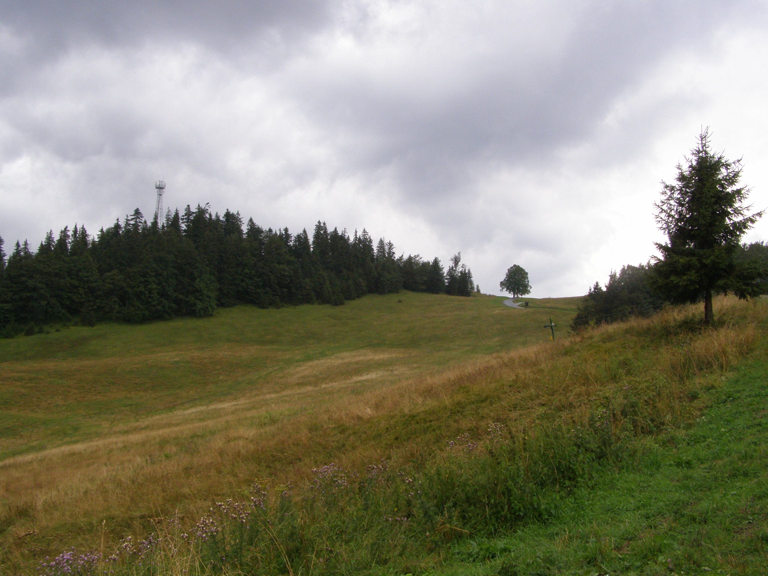 Starohorské vrchy, vrchol Baník (1056 m) a lyžařské vleky na jeho úbočí, obecDonovaly